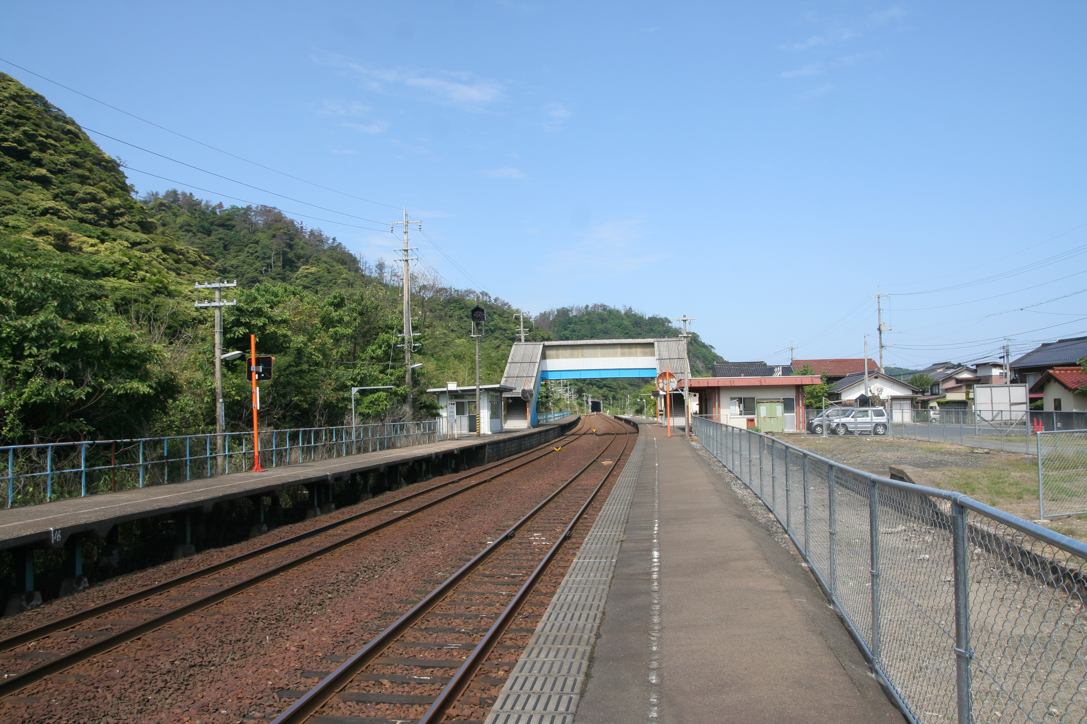 東浜駅の構内の様子